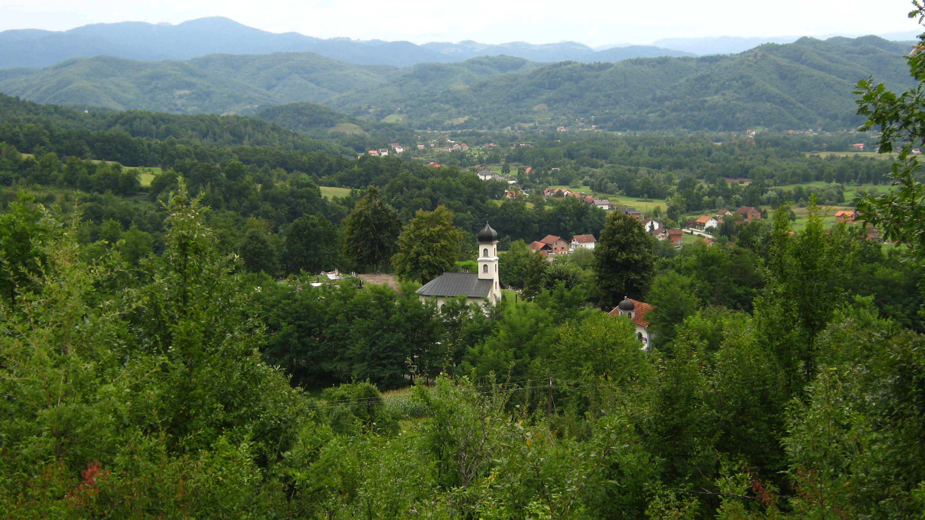 Аутор: ја лично